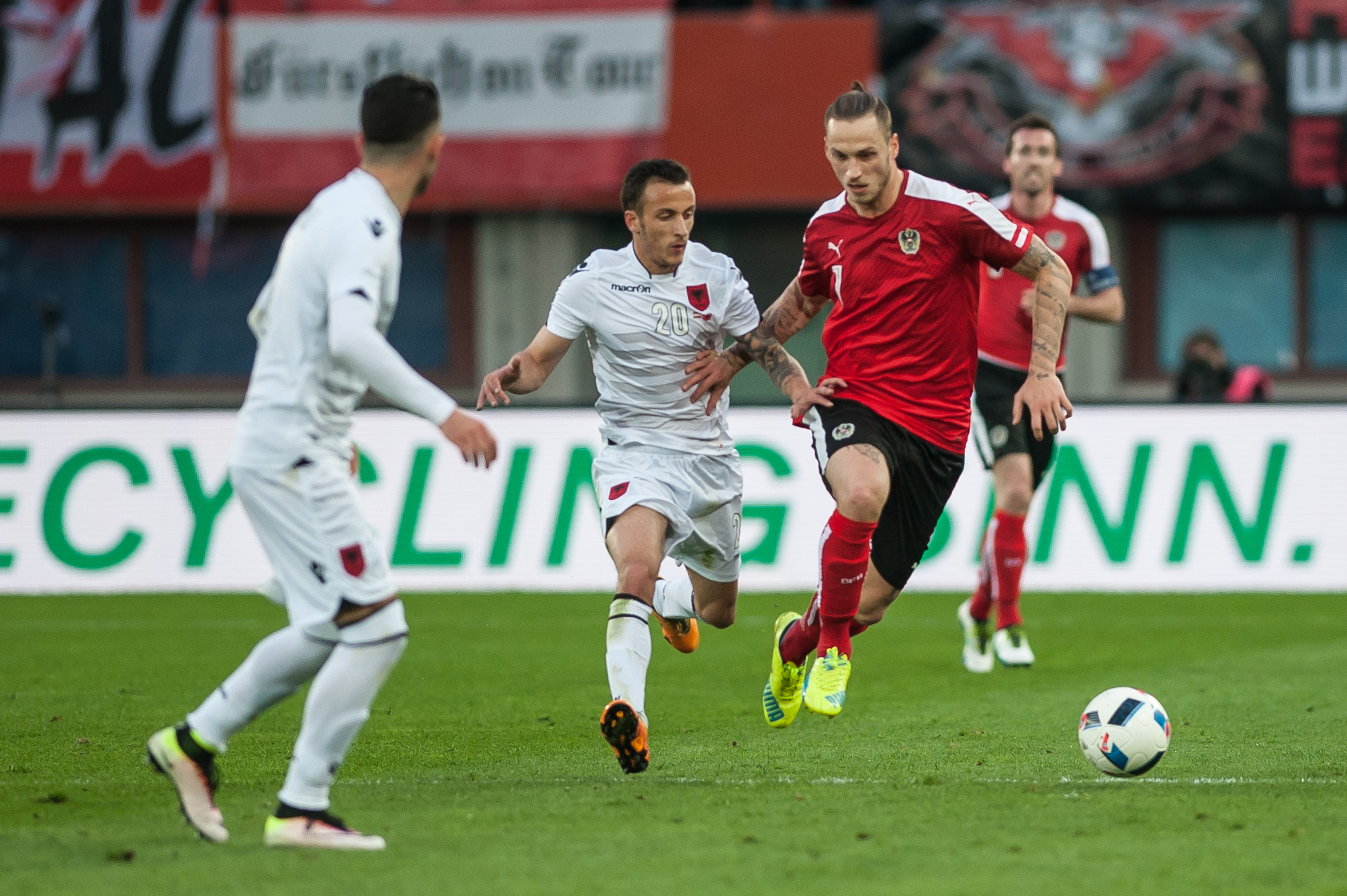 Wien, 26.03.2016, ÖFB Laenderspiel Oesterreich vs Albanien. Bild zeigt Ergys Kace (ALB) und Marko Arnautovic (AUT).